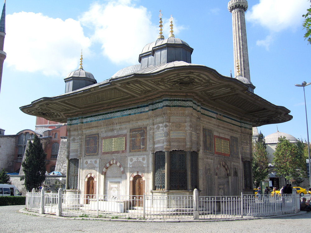 Brunnen Sultan Ahmet III